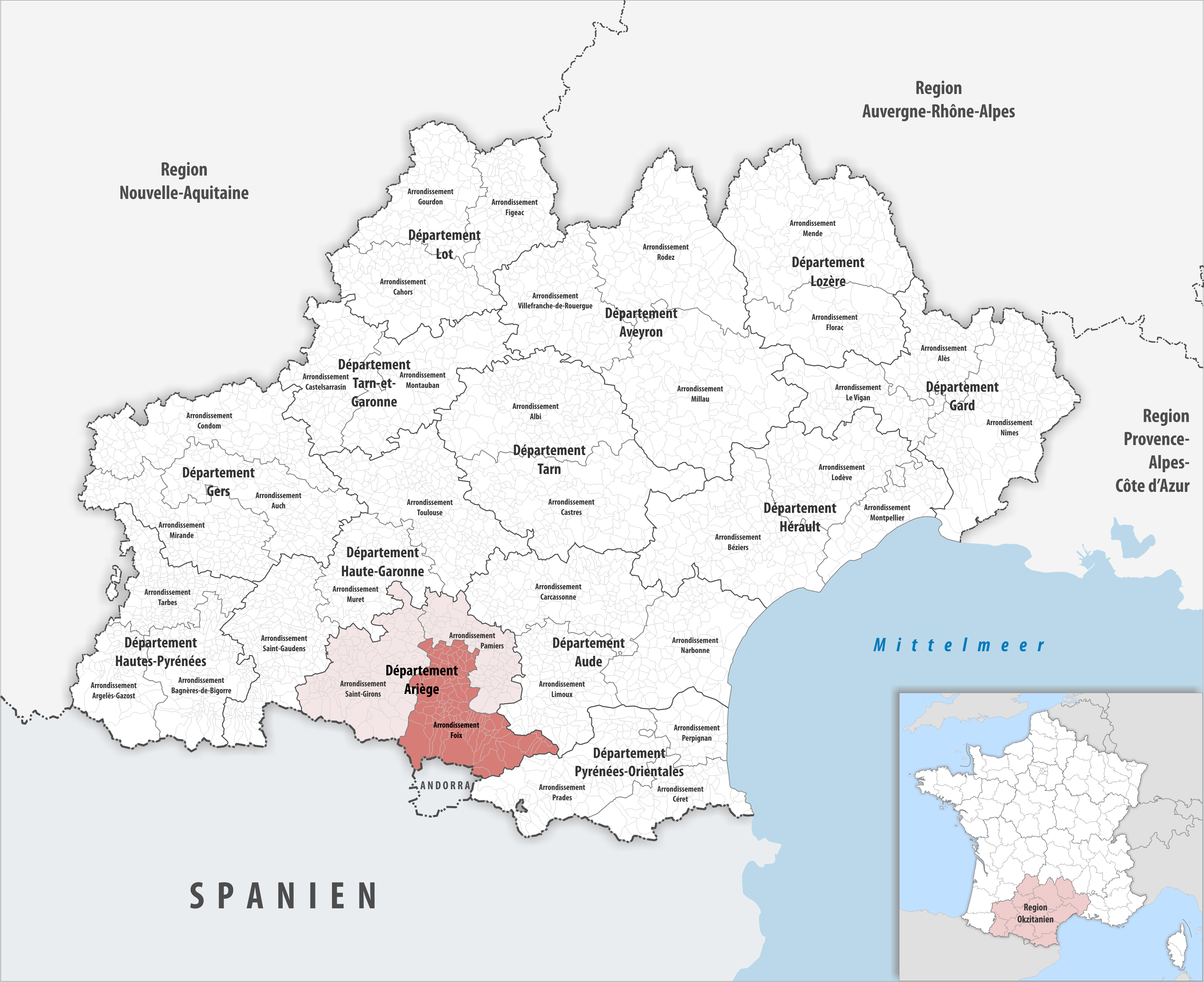 Lage des Arrondissements Foix